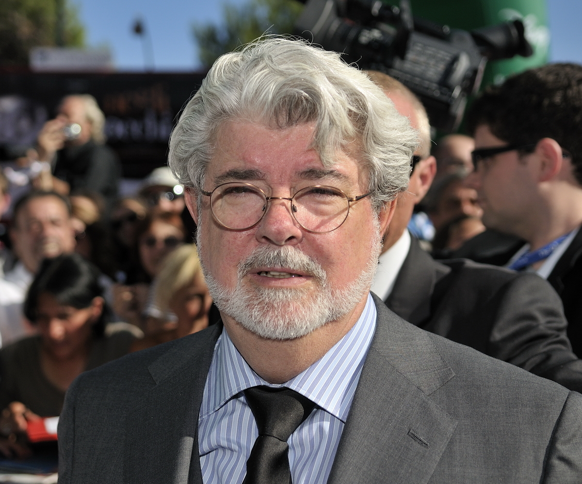 66ème Festival du Cinéma de Venise (Mostra), 5ème jour (06/09/2009) Geaorges Lucas et les réalisateurs de Pixar receoivent un Lion d'Or pour l'ensemble de leur carrière : John Lasseter (Toy Story, 1001 Pattes, Cars...), Brad Bird (Les Indestructibles, Ratatouille), Pete Docter (Monstres et Cie, Là-haut), Andrew Stanton (Le Monde de Nemo, WALL•E) et Lee Unkrich (Toy Story 2, Monstres et Cie, Le Monde de Nemo)